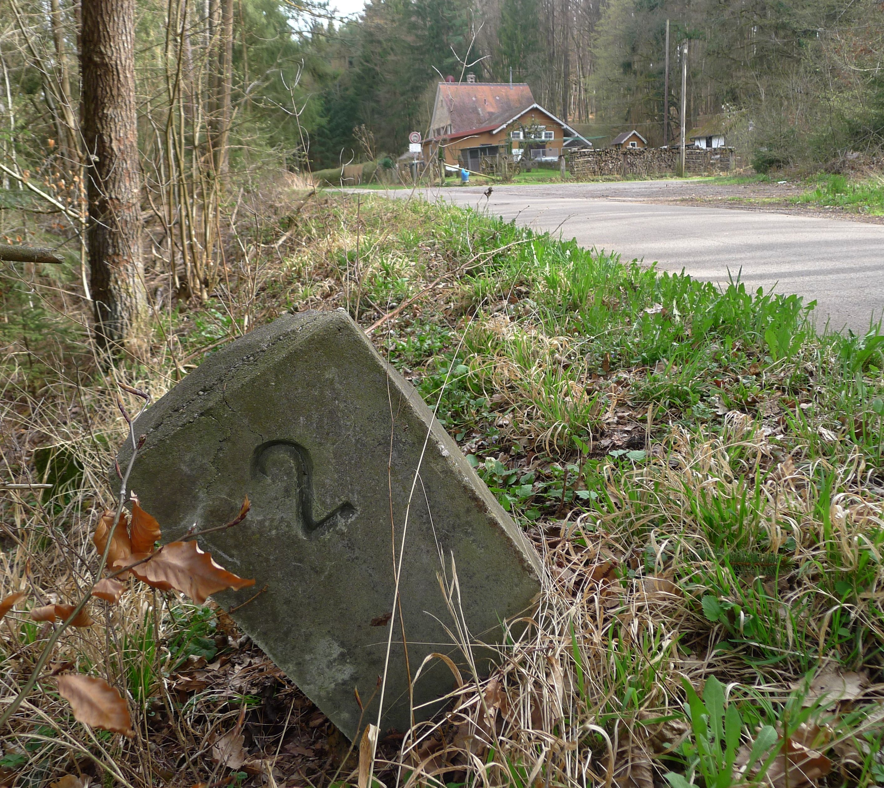 Kilometersteen 2 van de voormalige Siebenmühlentalbahn vlak voor het station van Steinenbronn (achtergrond)